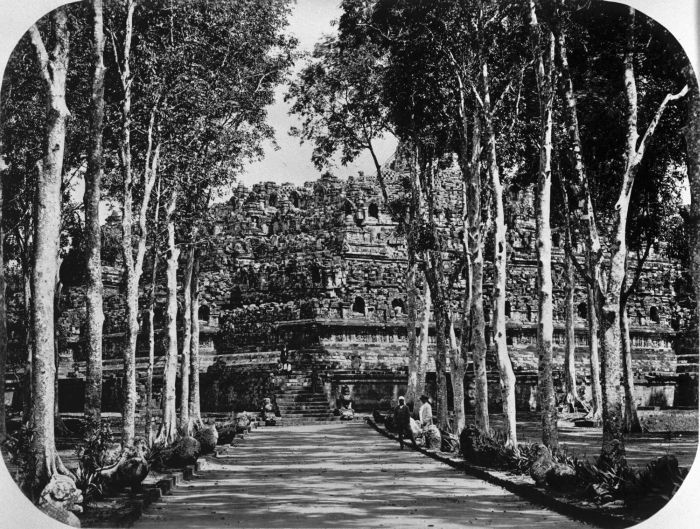 Foto. Borobudur